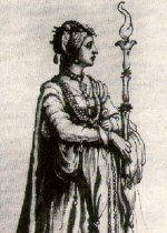 Viridis Visconti